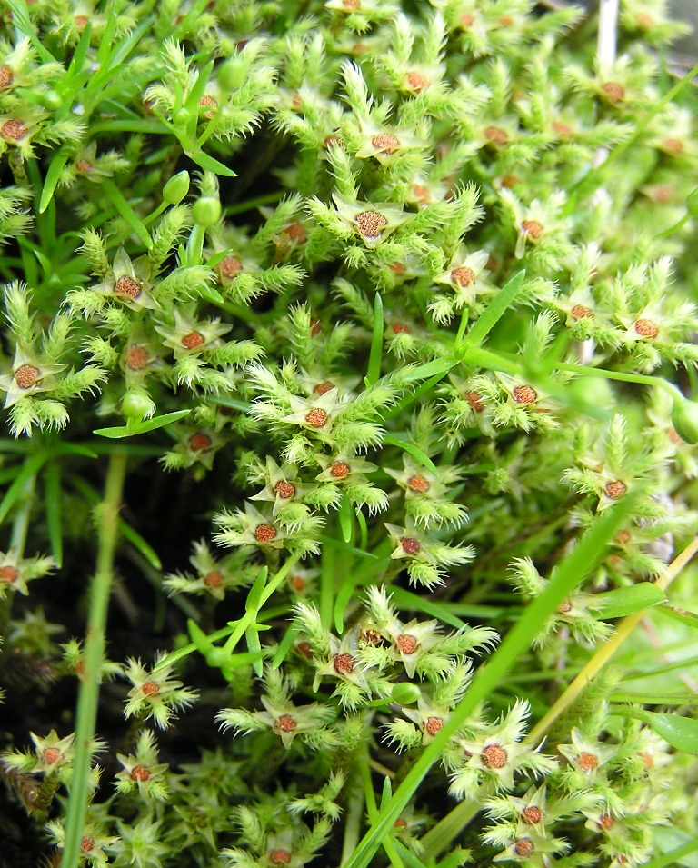 Philonotis fontana an einem Bachrand bei Filzmoos (Österreich).